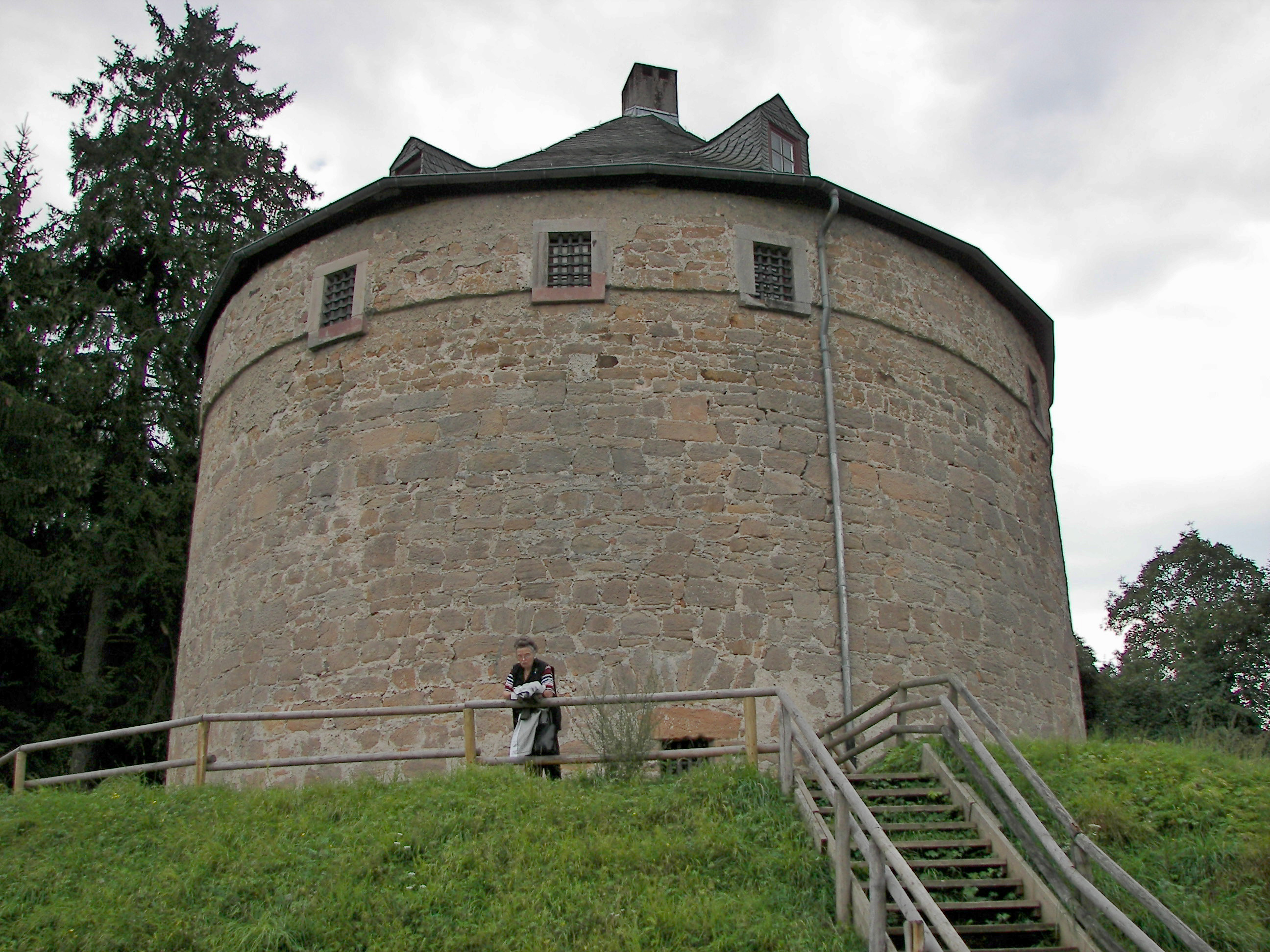 Marburger Schloss, Hexenturm